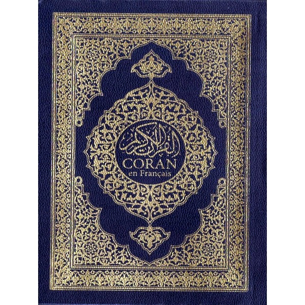 Coran-en-francais